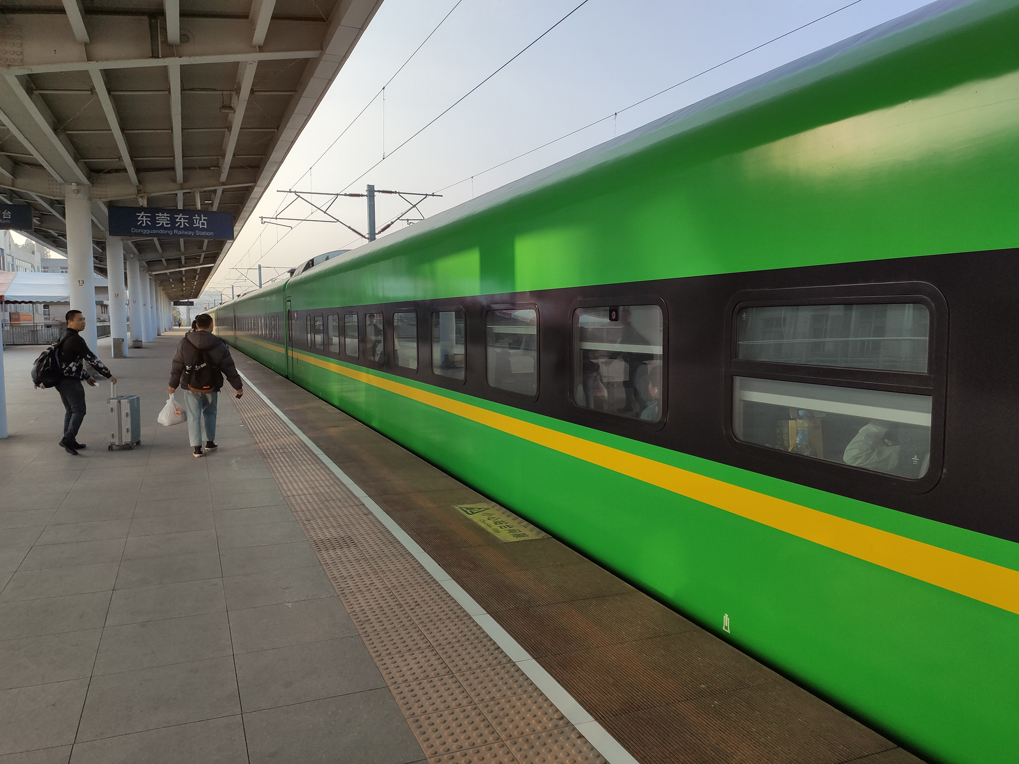 中文（中国大陆）: D727/728次CR200J型列车停靠东莞东站(20200103)